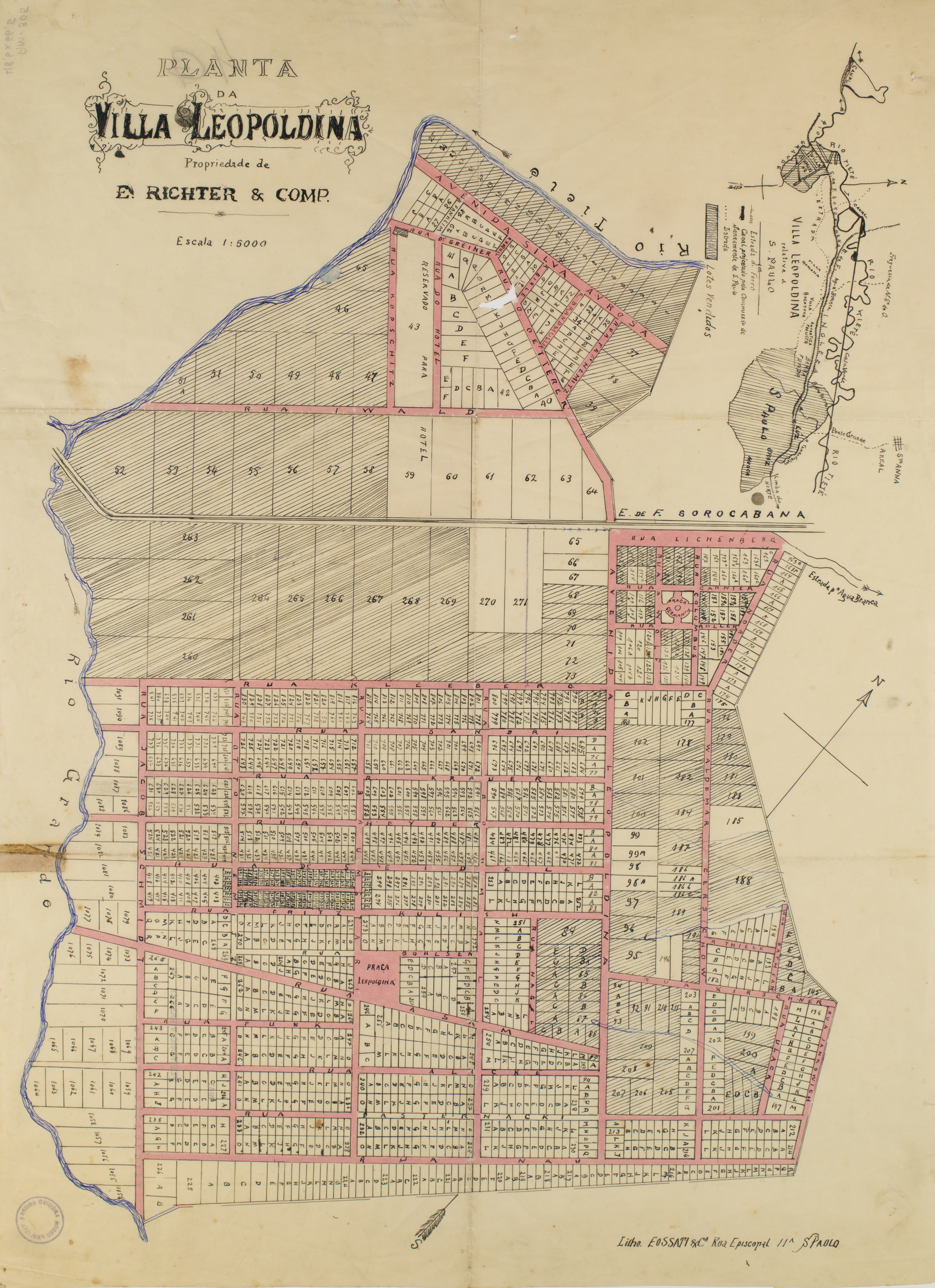 Obra que integra o acervo do Museu Paulista da USP. Coleção João Baptista de Campos Aguirra - Ref. Agente: Litografia Eossati & Cia. Rua Episcopal, 11 (São Paulo)